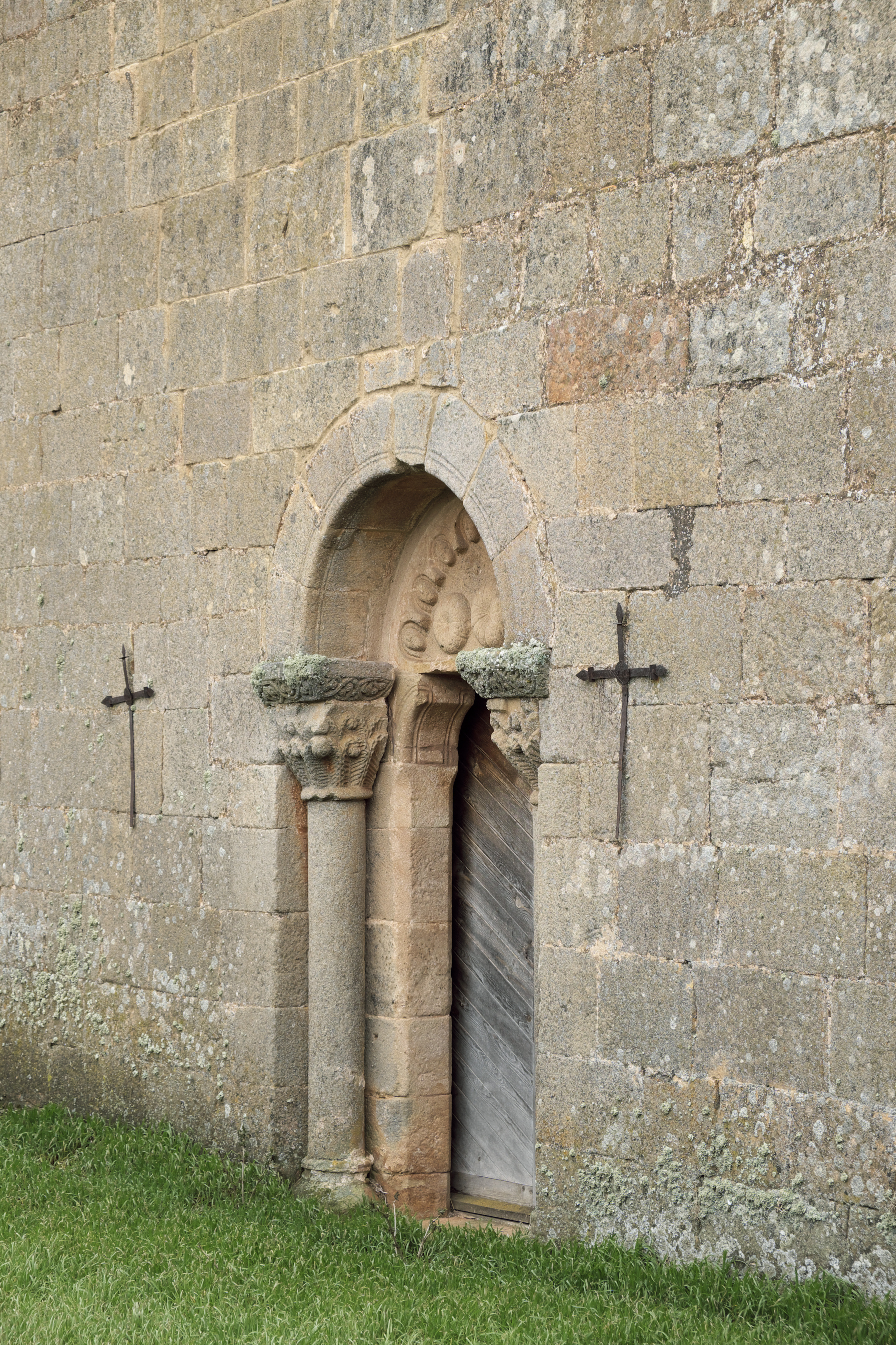 Kirche San Juan Bautista (Johannes der Täufer) in Tozalmoro in der Provinz Soria (Kastilien-León/Spanien), Nordportal